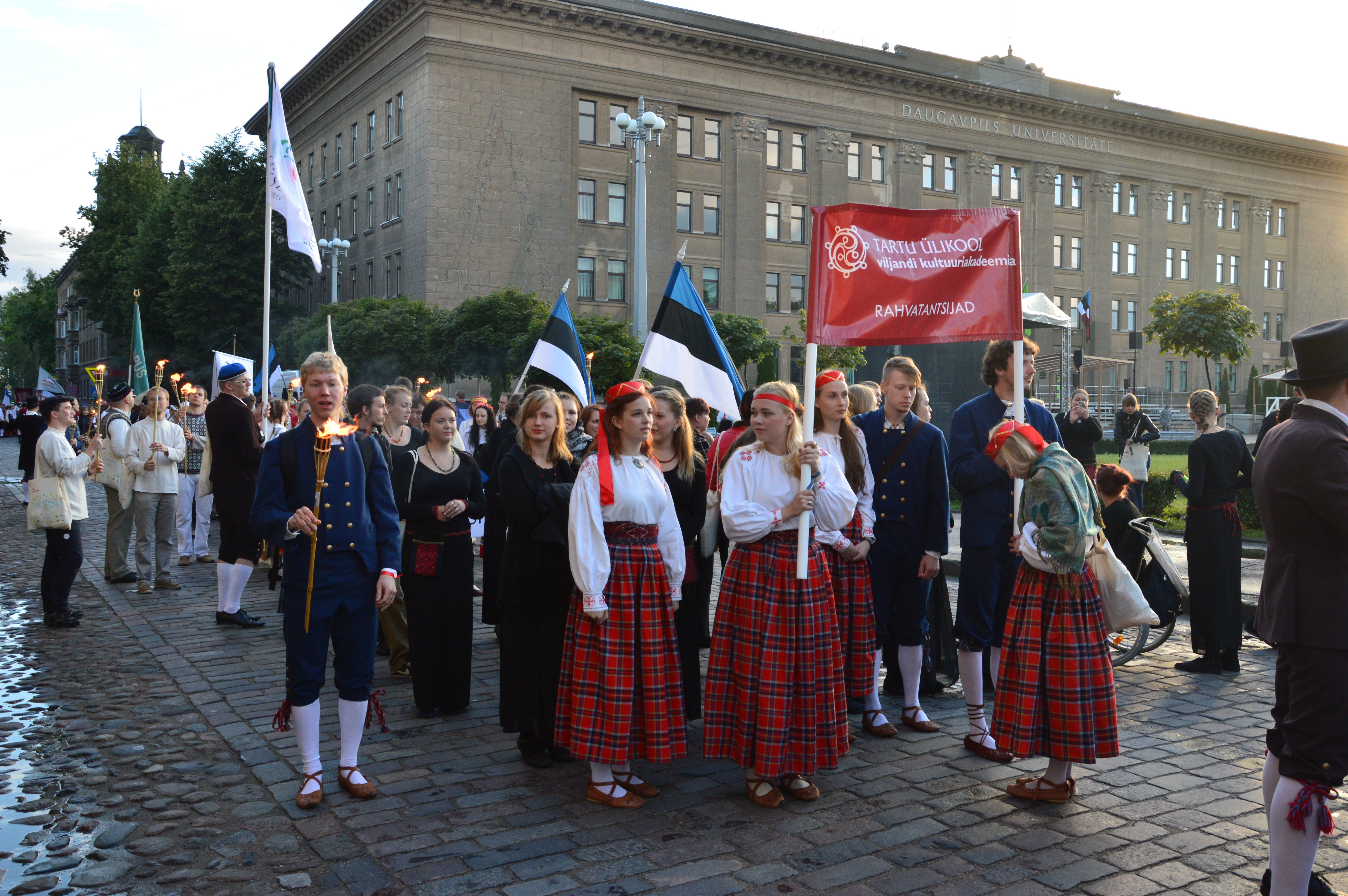 Viljandi Kultuuriakadeemia rahvatantsijad Gaudeamusel.